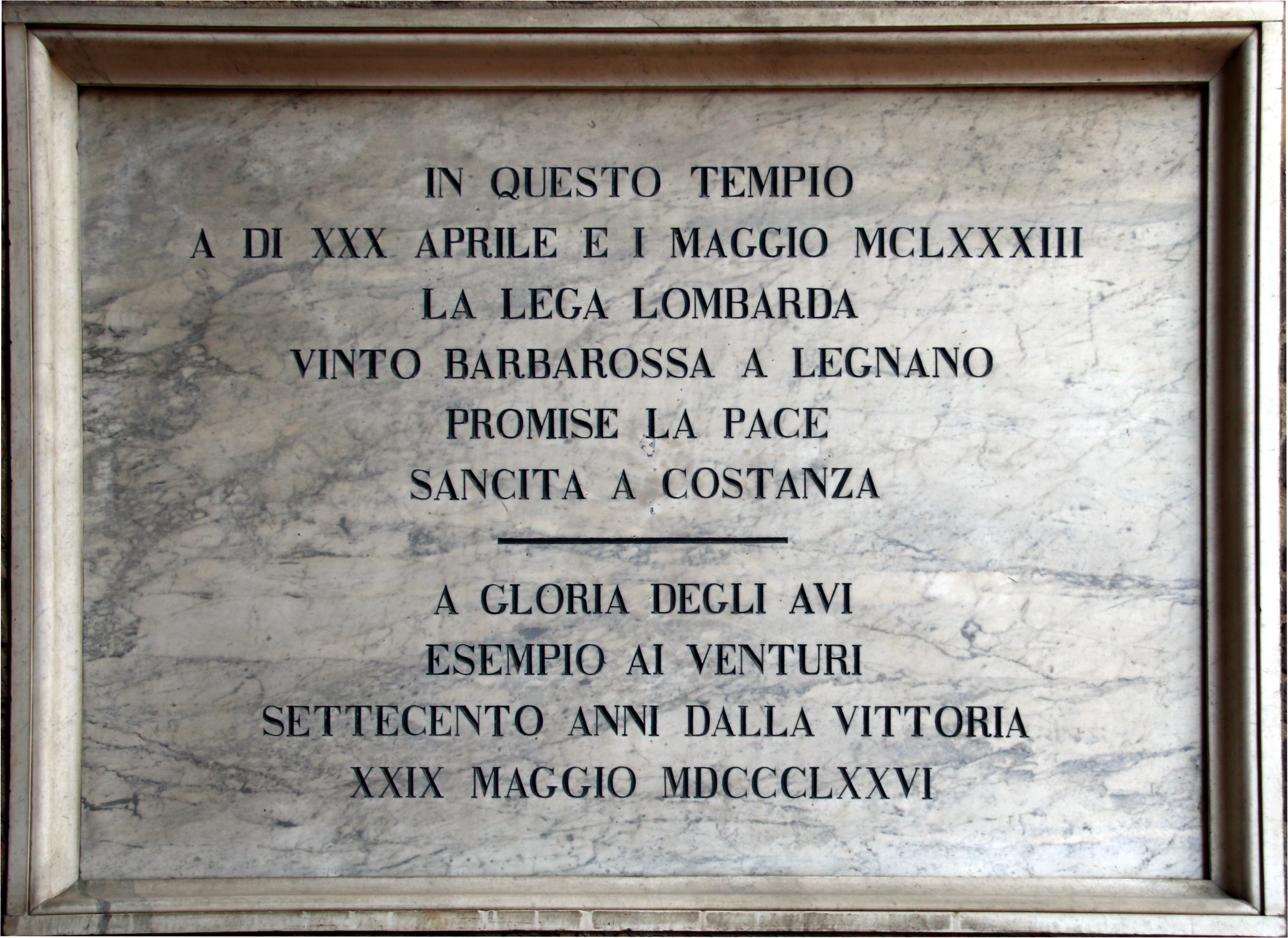 basilica di Sant'Antonino This is a photo of a monument which is part of cultural heritage of Italy.